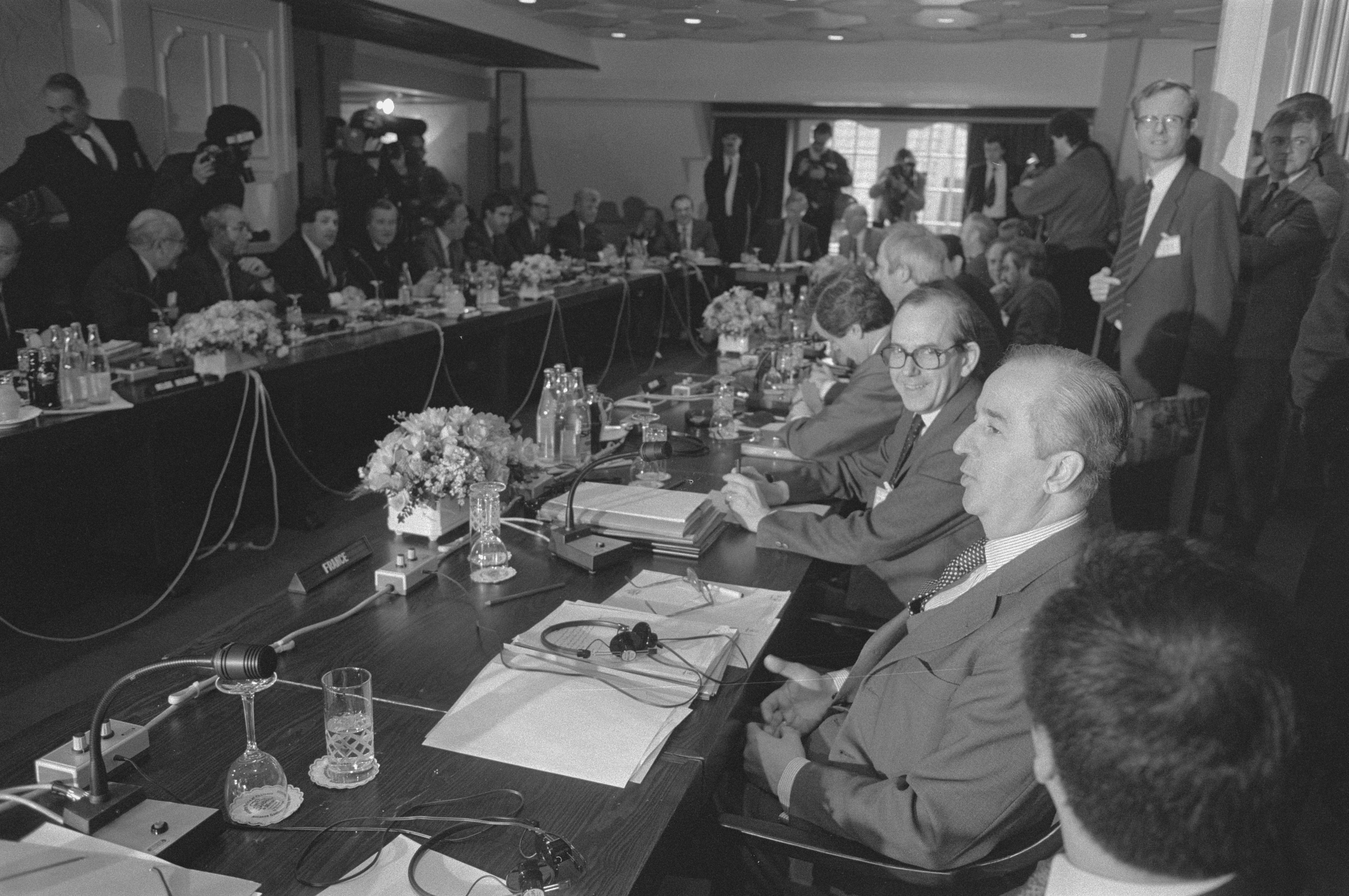 Collectie / Archief : Fotocollectie Anefo Reportage / Serie : Europese ministers van Financien bijeen in Ootmarsum i.v. aanpassing EMS Beschrijving : Overzichten o.m. met Balladur (Fr.) Datum : 5 april 1986 Locatie : Ootmarsum, Overijssel Trefwoorden : afgevaardigden, ministers, vergaderingen Persoonsnaam : Balladur, Édouard Fotograaf : Croes, Rob C. / Anefo Auteursrechthebbende : Nationaal Archief Materiaalsoort : Negatief (zwart/wit) Nummer archiefinventaris : bekijk toegang 2.24.01.05 Bestanddeelnummer : 933-6174